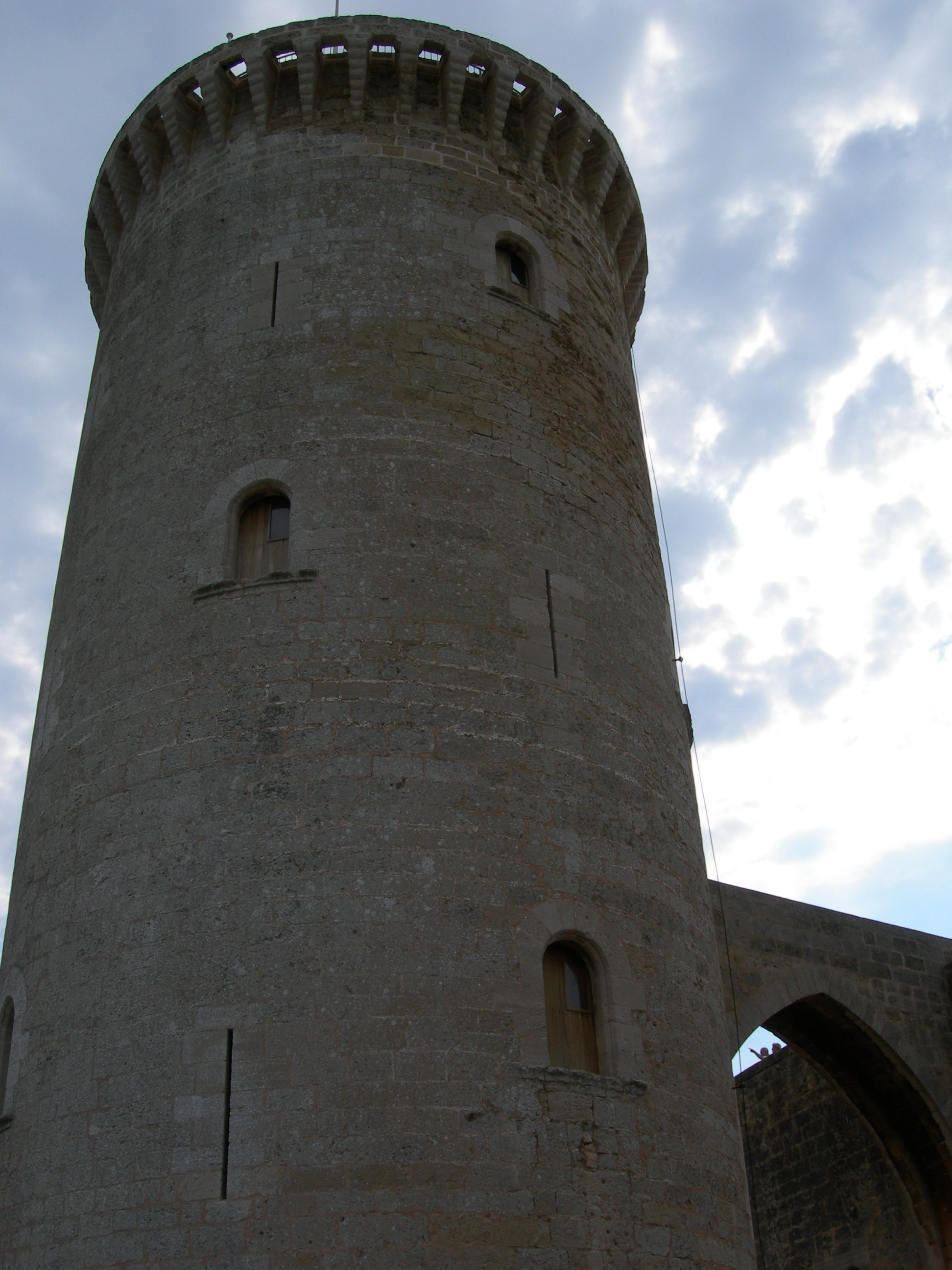 Torre del Homenajedel Castillo de Bellver en Mallorca, España.